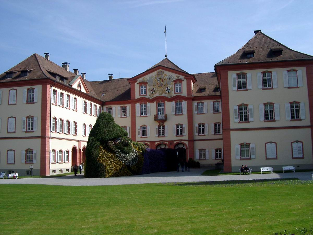 Insel Mainau